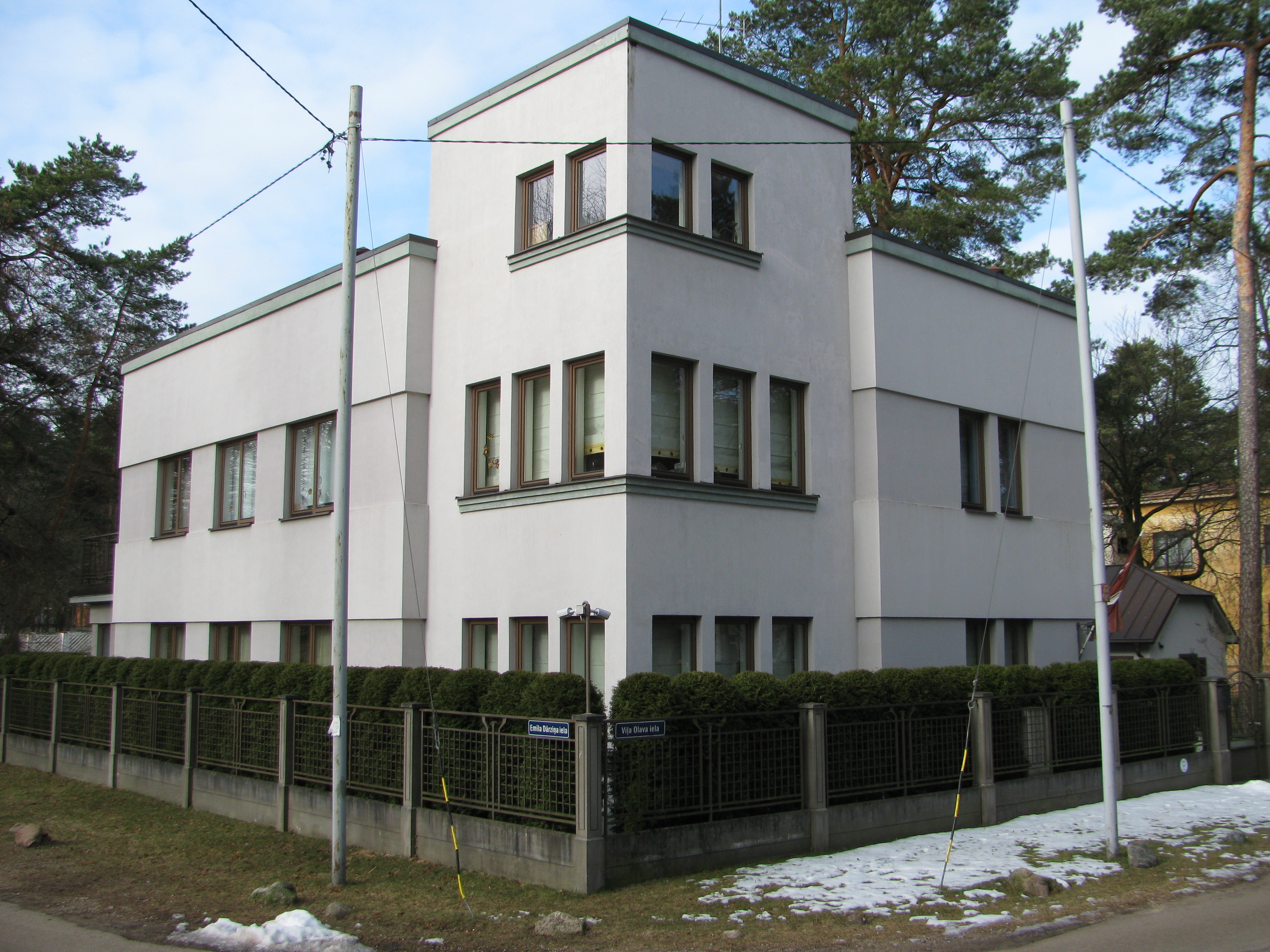 Savrupmāja, Ziemeļu rajons, Viļa Olava iela 11